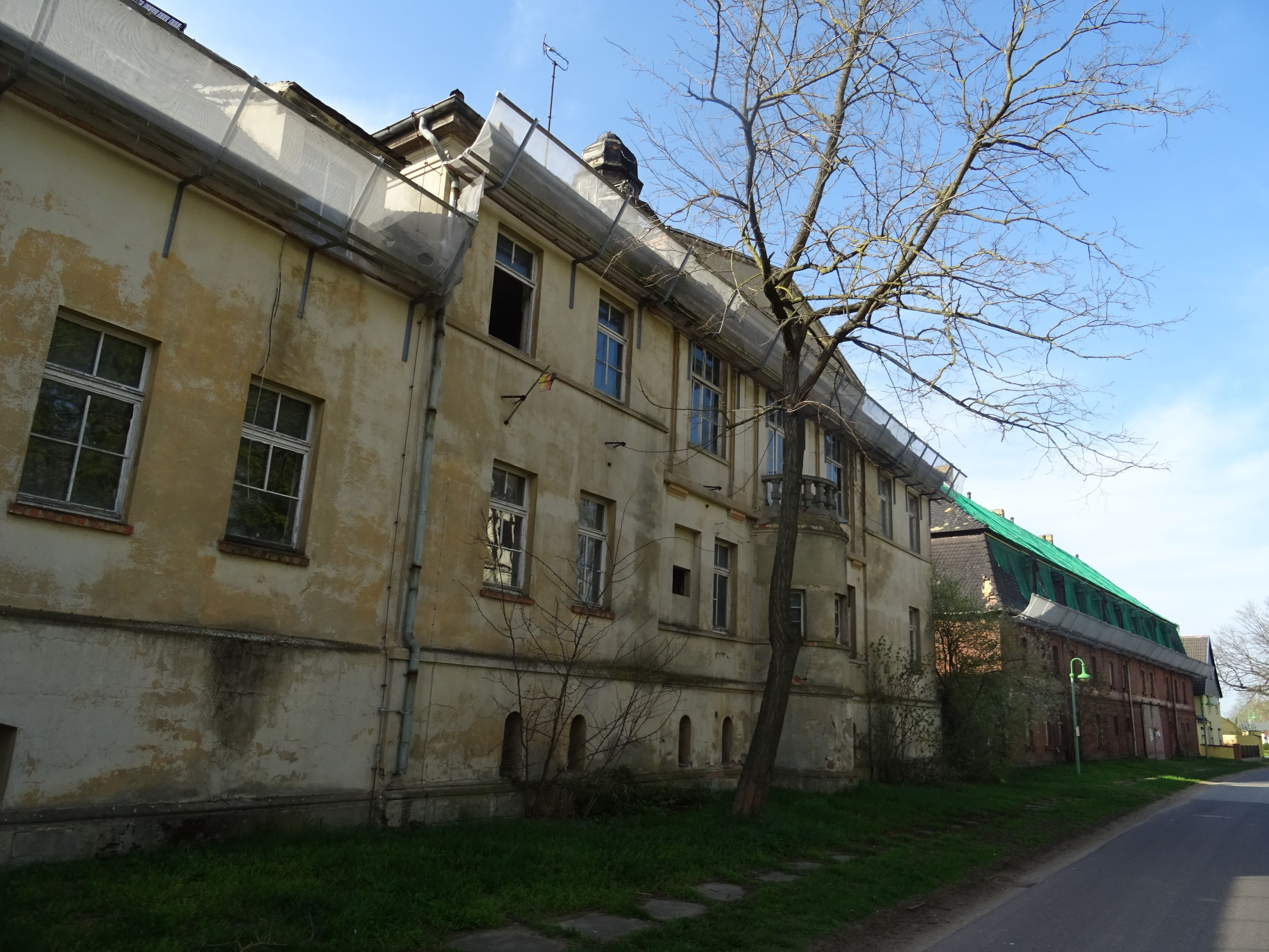 Bösewig Gutshof Rettel (westlich der Dorfstraße), denkmalgeschützt